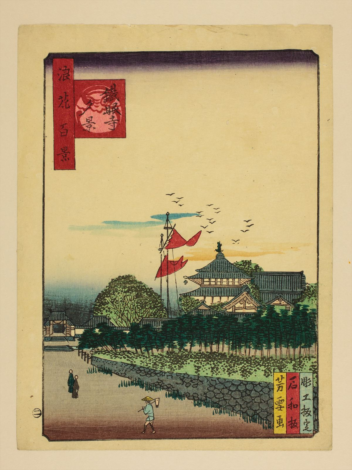 1800年代。南粋亭芳雪/画。浪花百景 102枚のうちの1枚。大阪市立中央図書館蔵。